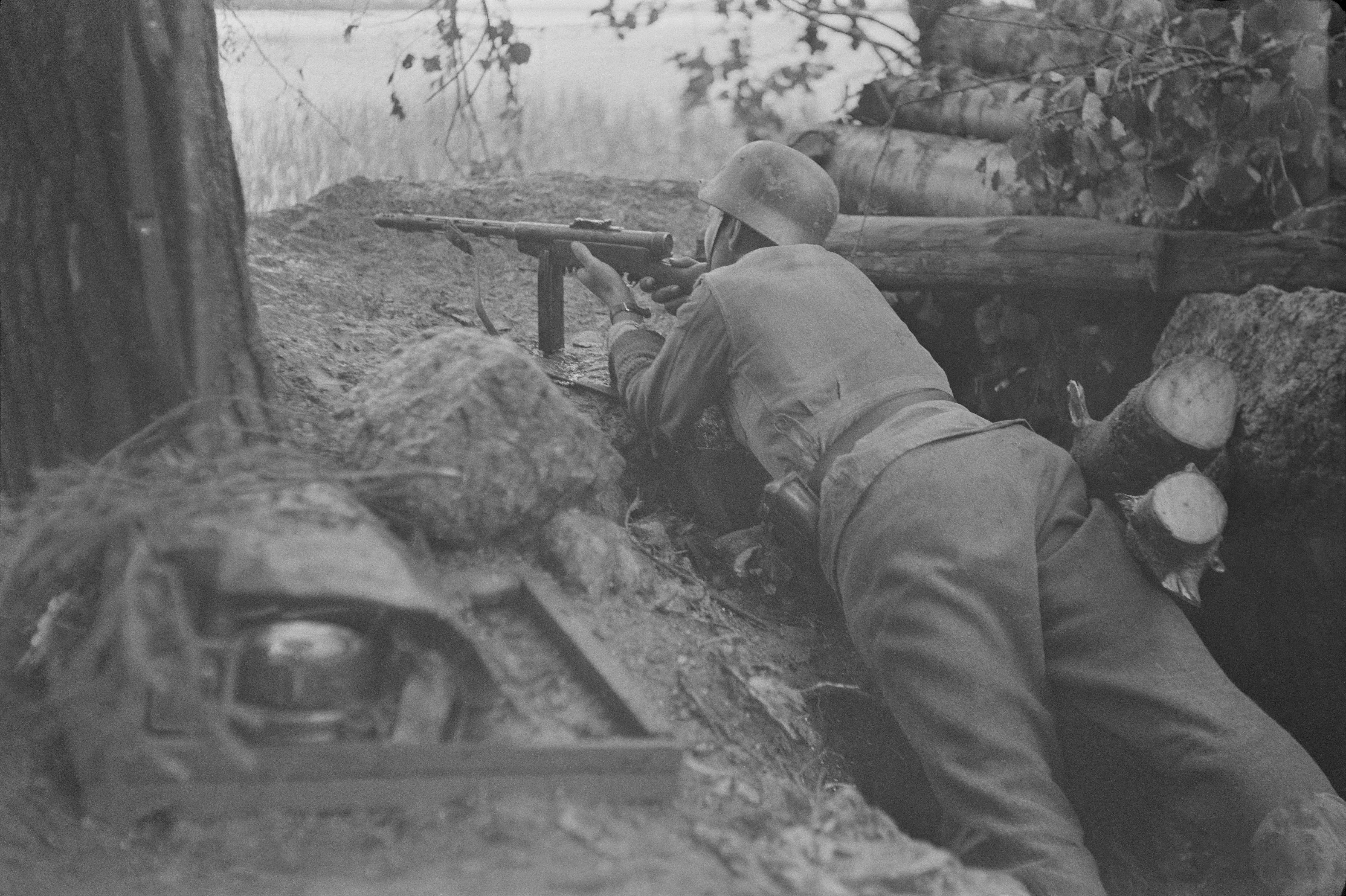 Konepistoolimies (Taustalla vihollisen hallussa olevaa Sorvalin rantaa). Tienhaara 1944.06.25